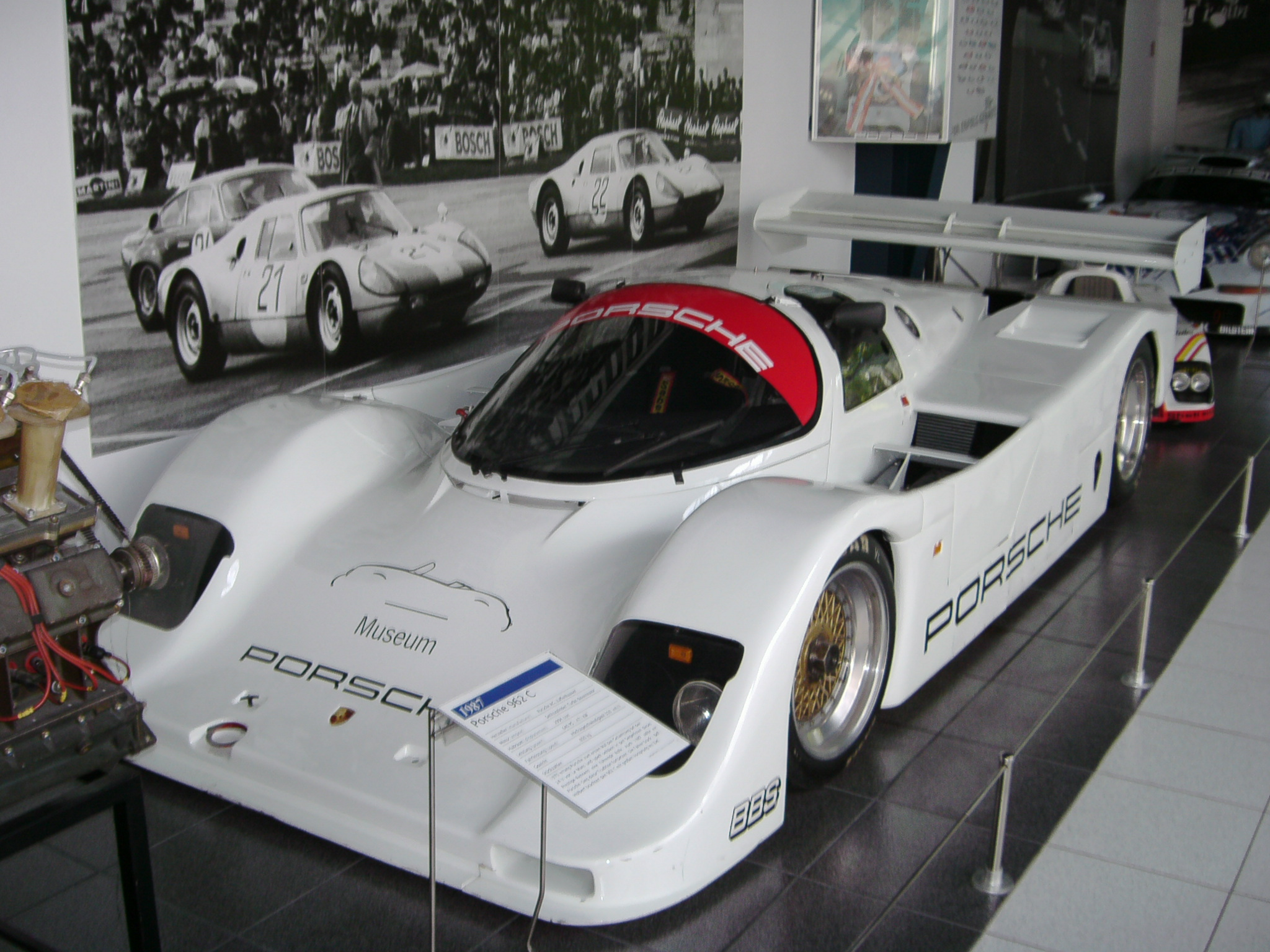 Im Vorfeld der für 1987 geltenden FISA-Vorschrift (Fédération Internationale du Sport Automobile) entwickelte Porsche den 956 zum 962 weiter. Beim Porsche 962 handelte es sich im Grunde genommen um einen Typ 956 mit neuer Pedalerie und mit einer um 12 cm nach vorne verlegten Vorderachse, sowie einen Stahlüberrollkäfig. Der Sechszylinder-Turbo war jetzt wassergekühlt und leistete 700 PS. Eine technische Neuerung stellte das halbautomatische Porsche-Doppelkupplungsgetriebe, mit dem der 962 C wahlweise ausgerüstet wurde. Auch am Championat hatte sich etwas geändert: Die Rennserie erhielt einen neuen Namen und hieß jetzt Sportwagen-Weltmeisterschaft. Nicht nur in Le Mans, auch in der Sportwagen-WM und in der amerikanischen IMSA setzte Porsche mit dem 962 C seine Siegesserie fort, die erst 1990 durch ein neues Handicap-Reglement zu Ende ging. Ab 1991 fuhren dann Saugmotoren-Rennwagen um den Sieg. Nach 41 Siegen in der Sportwagen-WM und sechs Triumphen in Le Mans rollte mit dem Porsche 956/962 C der erfolgreichste Rennsportwagen aller Zeiten ins Museum. Technische Daten: Modell: Porsche 962 C Coupé in Kurz- und Langheckversion Baujahr: 1985-1990 Motor: 6-Zylinder Boxermotor, luft-/wassergekühlt, Vierventiler, je 2 obenliegende Nockenwellen Hubraum: 2.994 ccm Bohrung x Hub: 95 x 70,4 mm Leistung: 700 PS (514 kW) bei 8.200 1/min Drehmoment: 710 Nm bei 5.400 1/min Gemischaufbereitung: elektronische Einspritzung, 2 Turbolader, Ladeluftkühler Kraftübertragung: 6 Vorwärts-, 1 Rückwärtsgang, starrer Durchtrieb Bremsanlage: Scheibenbremsen, innenbelüftet Fahrleistung: Höchstgeschwindigkeit ca. 350 km/h Gewicht: 820 kg Reifengröße vorne / hinten: 325/625 x 17 / 350/680 x 19 Radstand: 2.795 mm Spurweite vorne / hinten: 1.634 / 1.590 mm Maße (L x B x H): 4.800 x 2.000 x 1.030 mm Quelle: Photo by